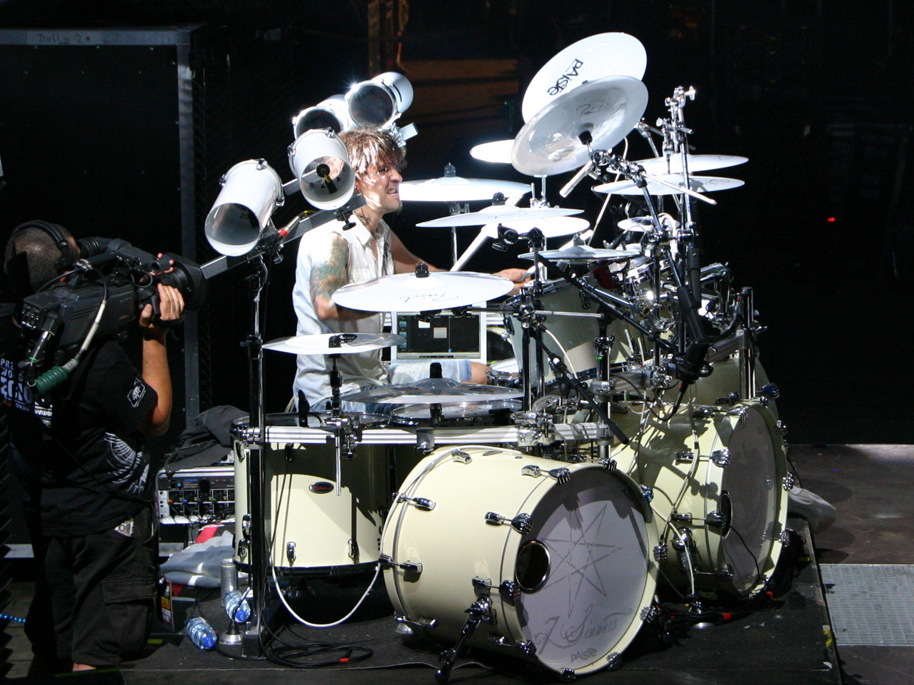 Daniel „Dani“ Loeble z Helloween na Przystanek Woodstock w 2011 r.